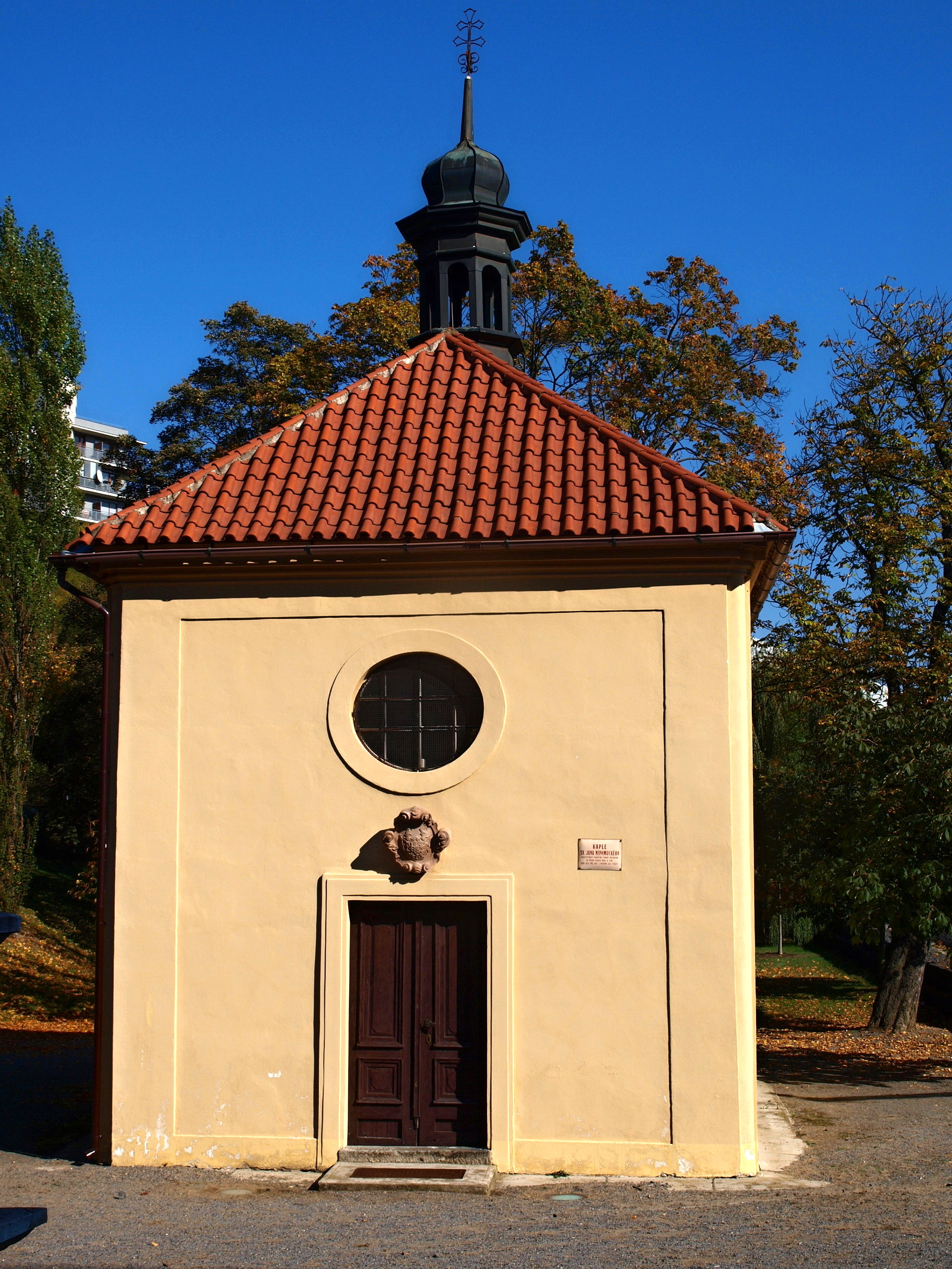 Kaple sv. Jana Nepomuckého v Radlicích